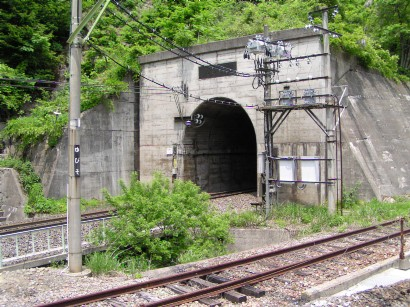 2005年5月29日に投稿者が撮影したものです。湯檜曽駅地上ホームから見た新清水トンネル。